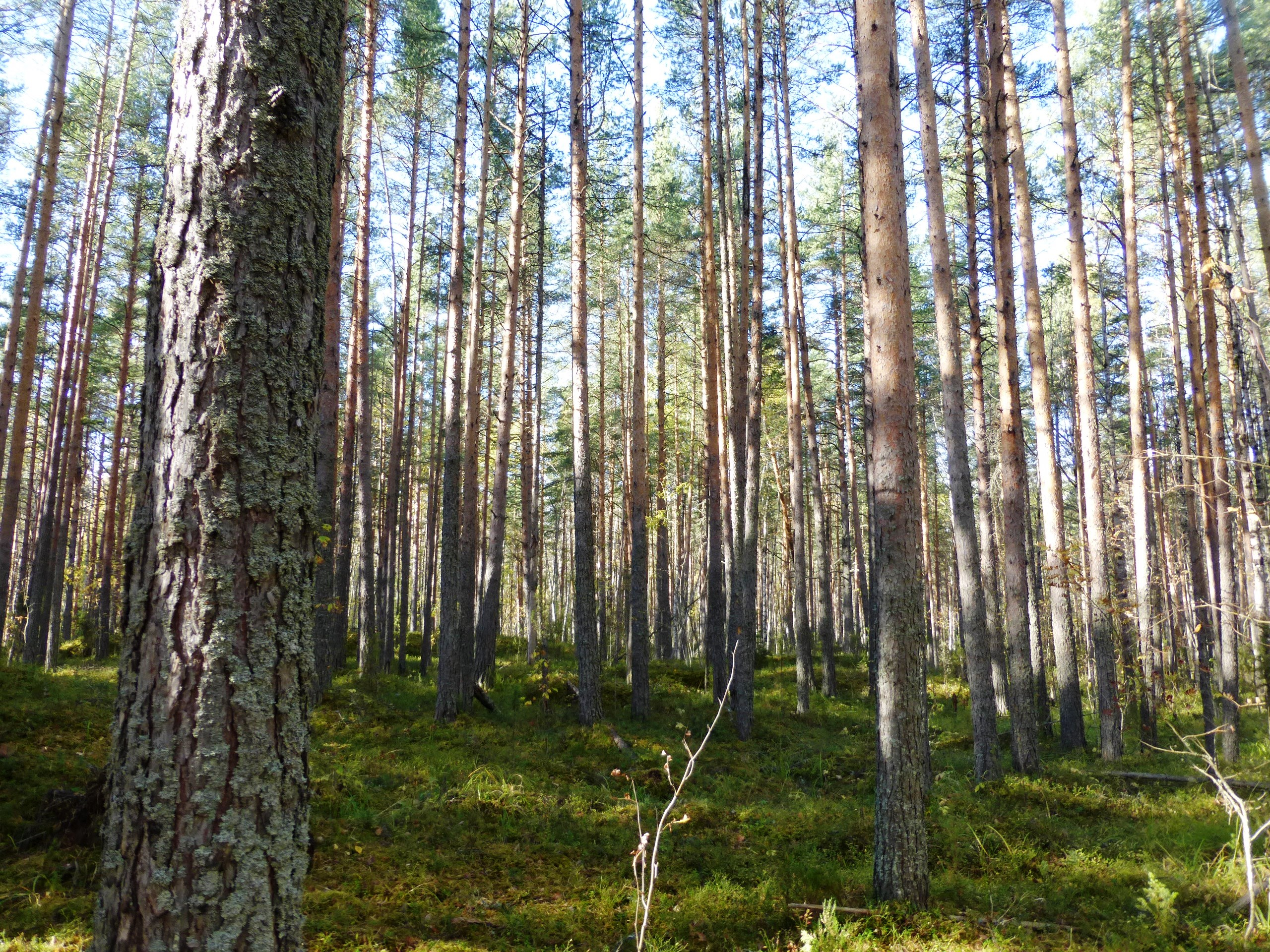 Сосновый бор в Прионежском районе Карелии вблизи посёлка Шуйская Чупа.